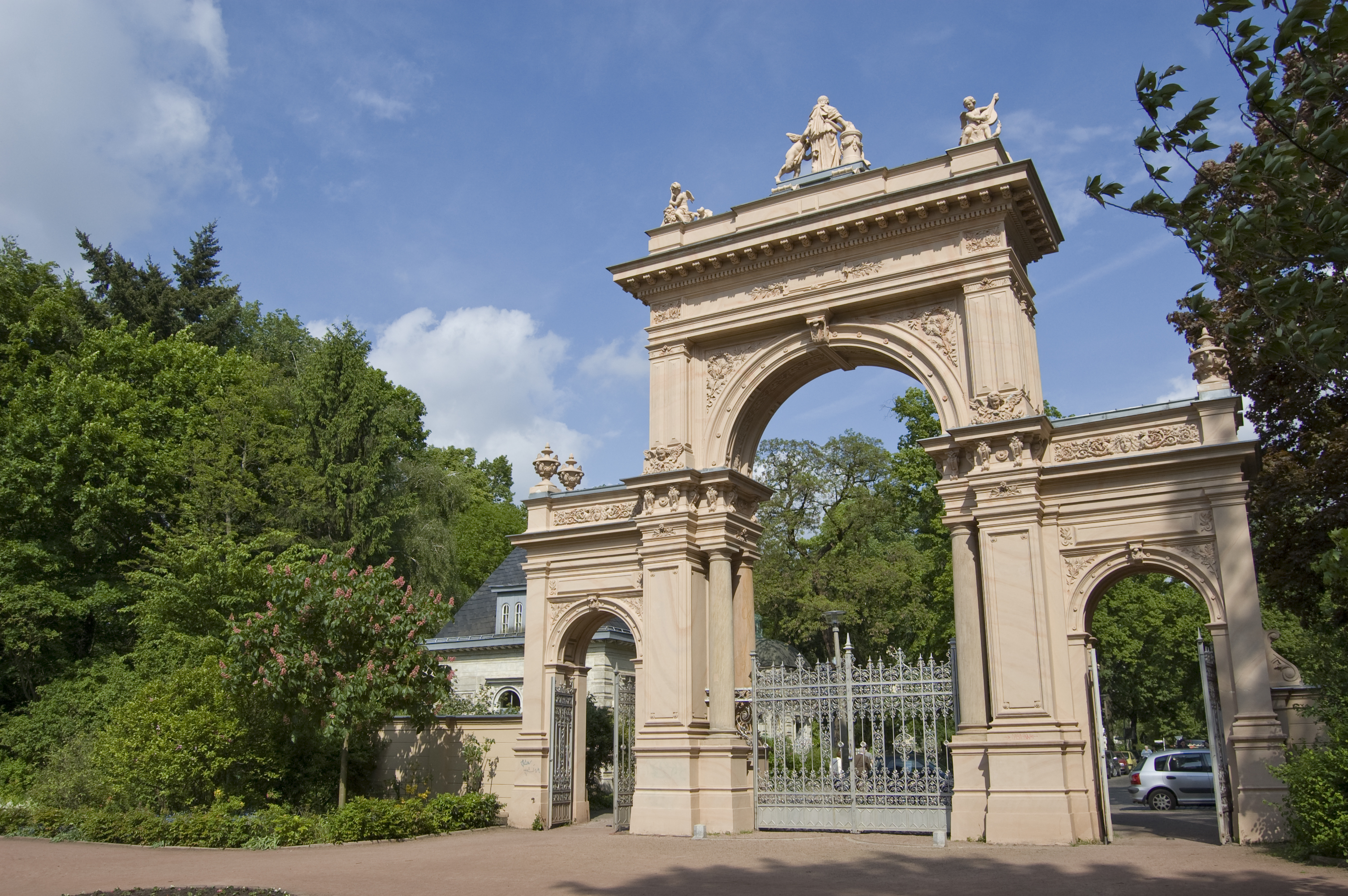 Das Eingangstor des Bürgerparks in Berlin-Pankow nach der Renovierung. Ansicht von innerhalb des Parkes.